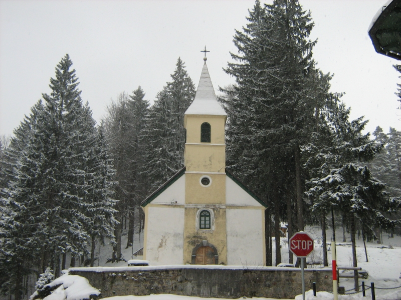 Kapela sv. Antuna Padovanskog u Staroj Sušici